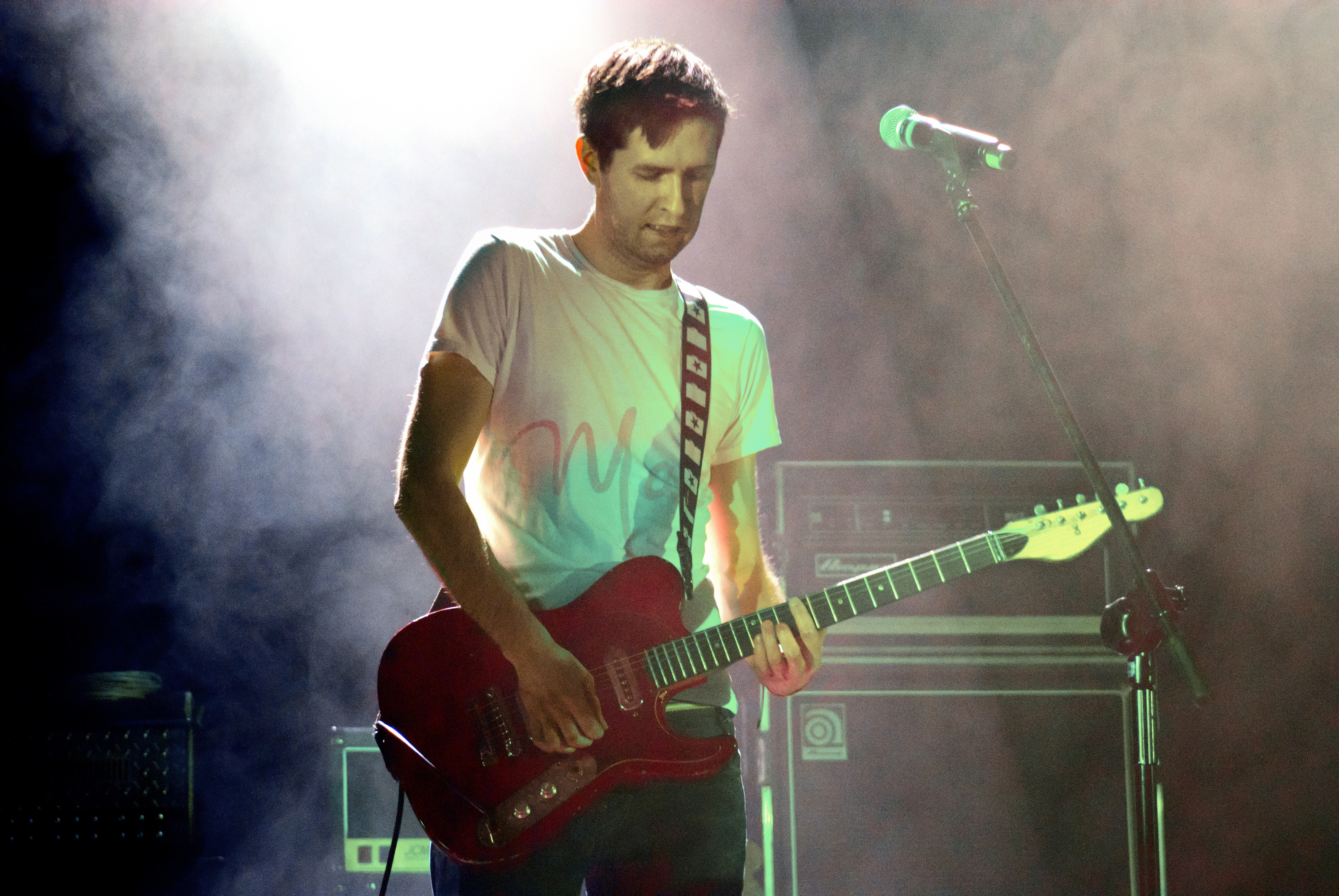 Paweł Szupiluk, gitarzysta zespołu Renton, podczas koncertu 25.11.2011 w Teatrze Dramatycznym. Europejskie Targi Muzyczne Co Jest Grane, Warszawa